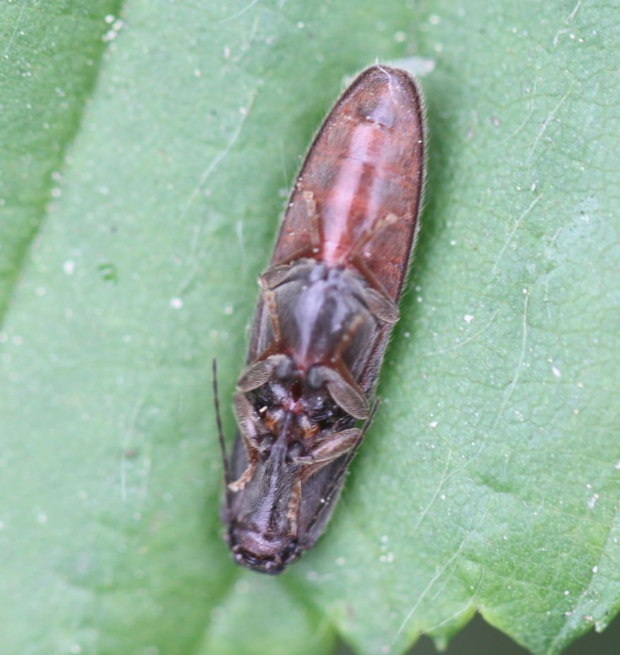 Rotbauchiger Laubschnellkäfer (Athous haemorrhoidalis) am 29. April 2020 nahe Heidelberg